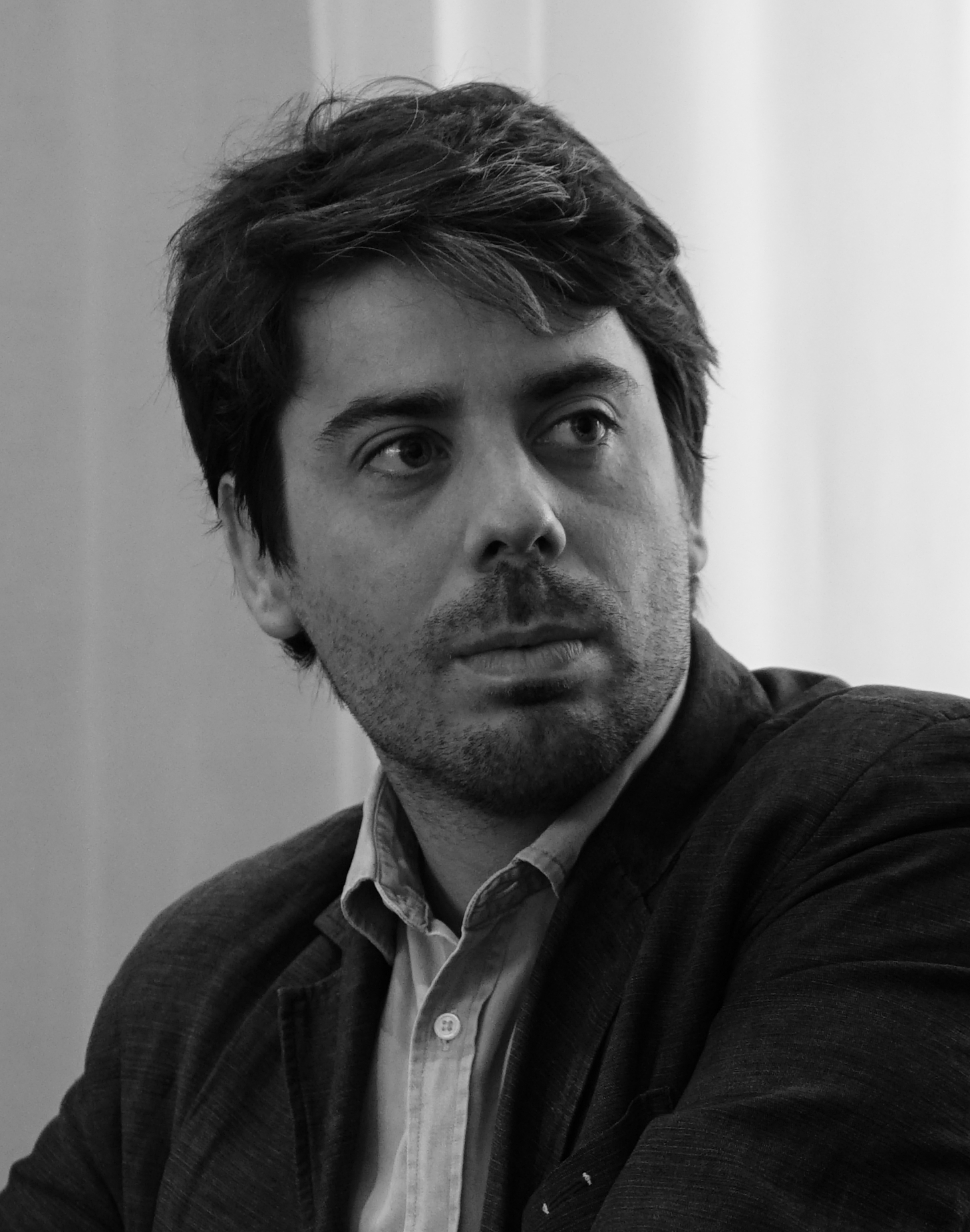 lors du livre sur la place.